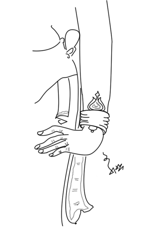 ஊரு ஹஸ்தம்